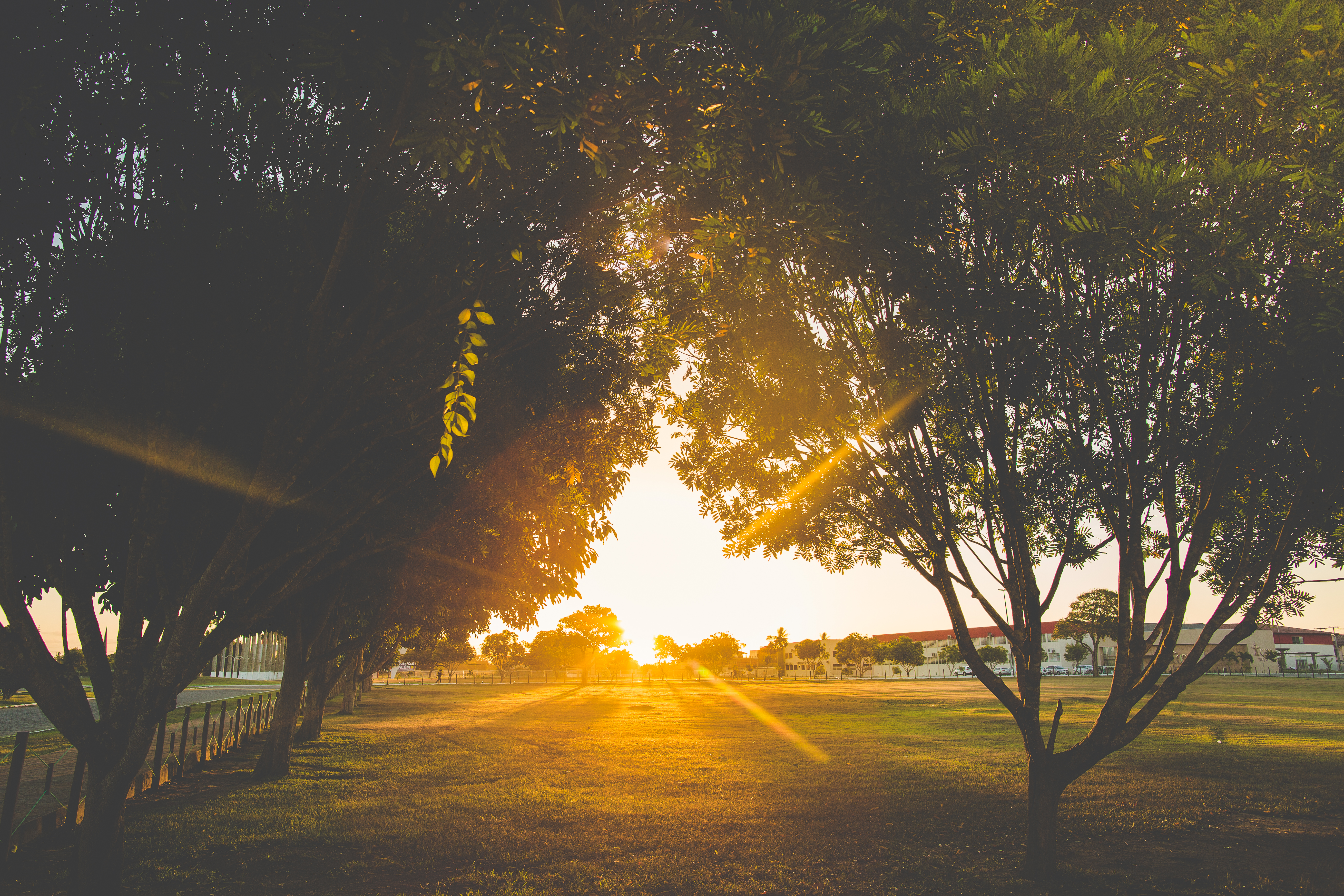 Campus